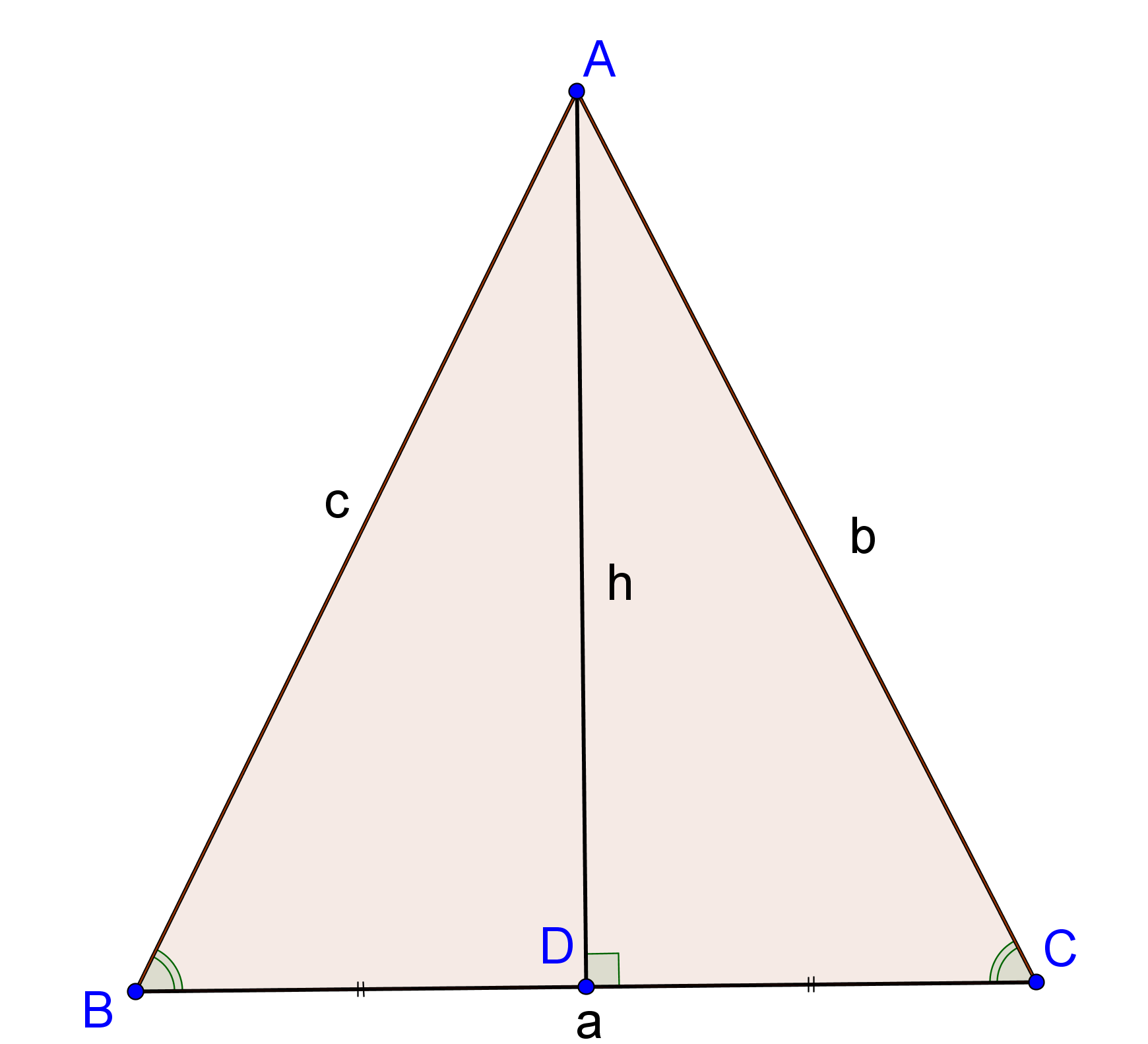 تساعد الصورة على ايضاح علاقة الارتفاع بالمثلث المتطابق الضلعيين